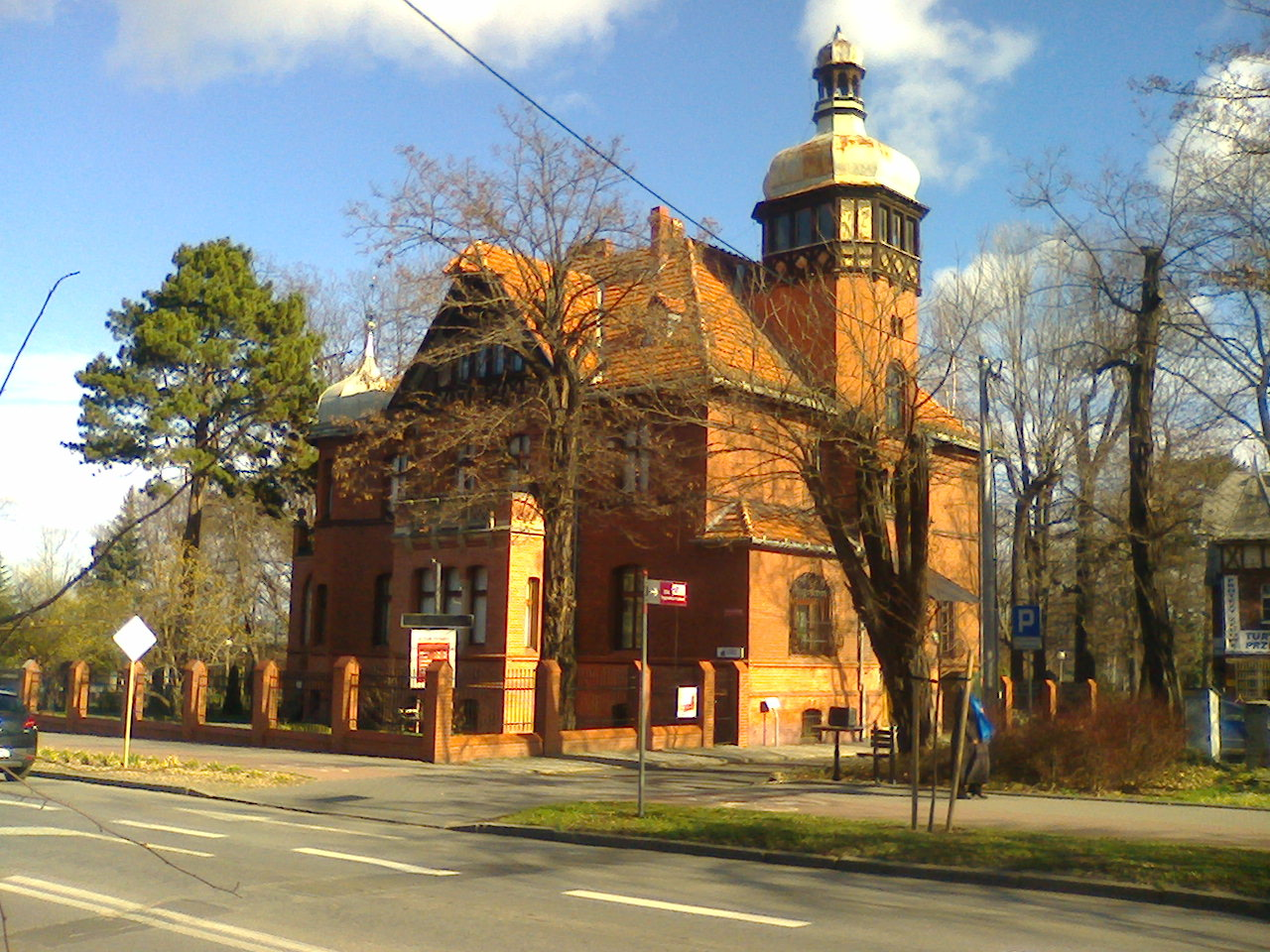 Dzierżoniów, ul. Świdnicka